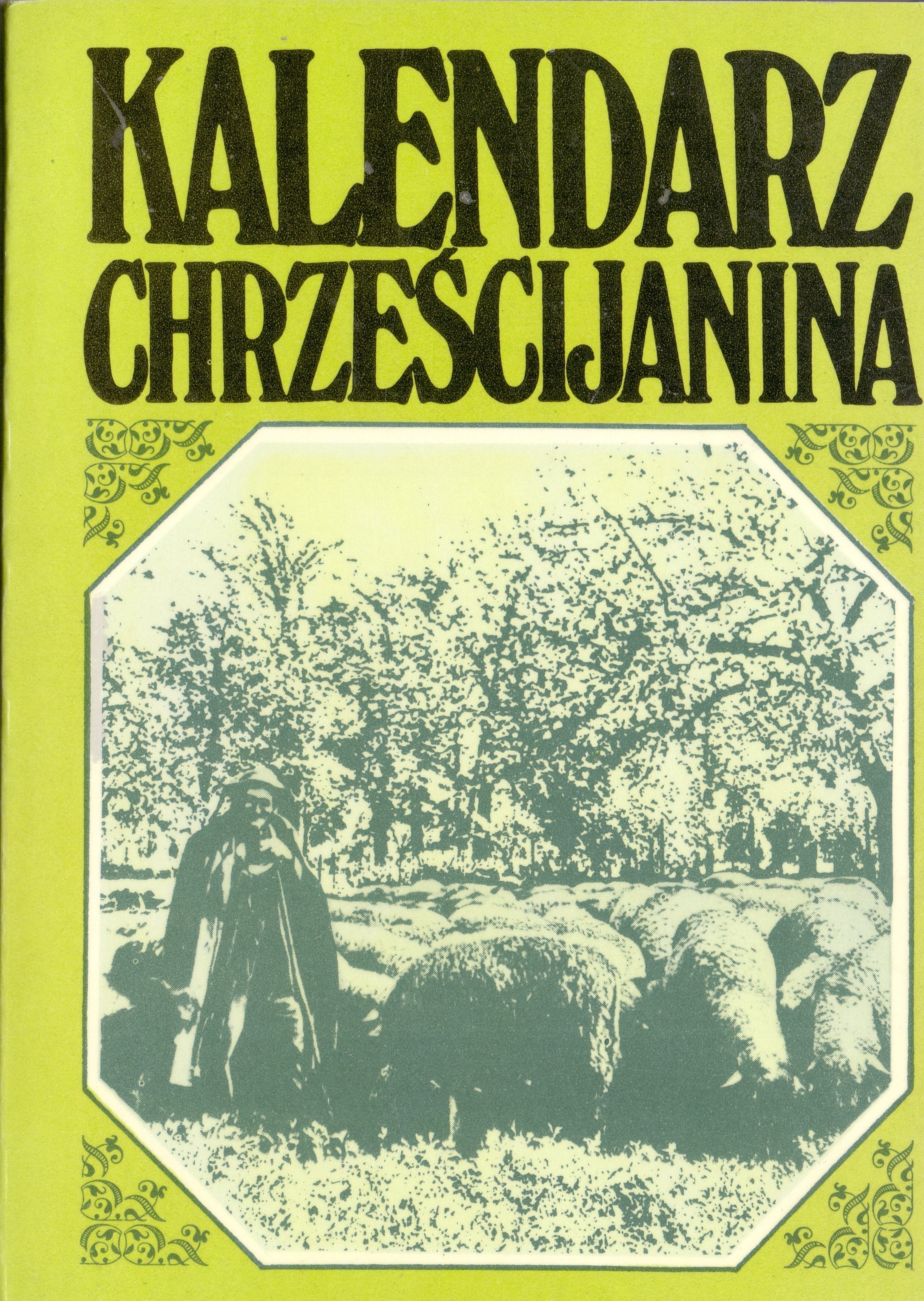 okładka Kalendarza Chrześcijanina na rok 1979